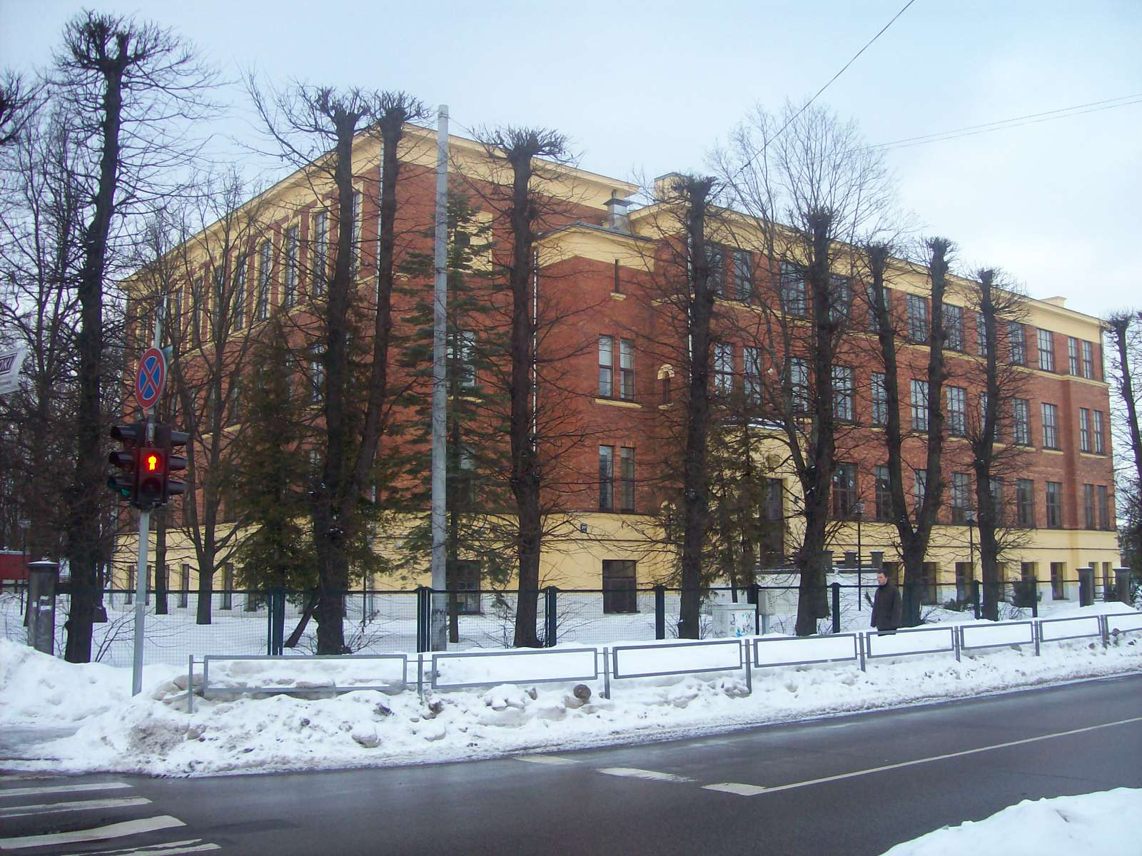 Rīgas Valsts vācu ģimnāzijas vēsturiskā ēka. Arhitekts: Indriķis Blankenburgs (miris 1944. gada 16. oktobrī)